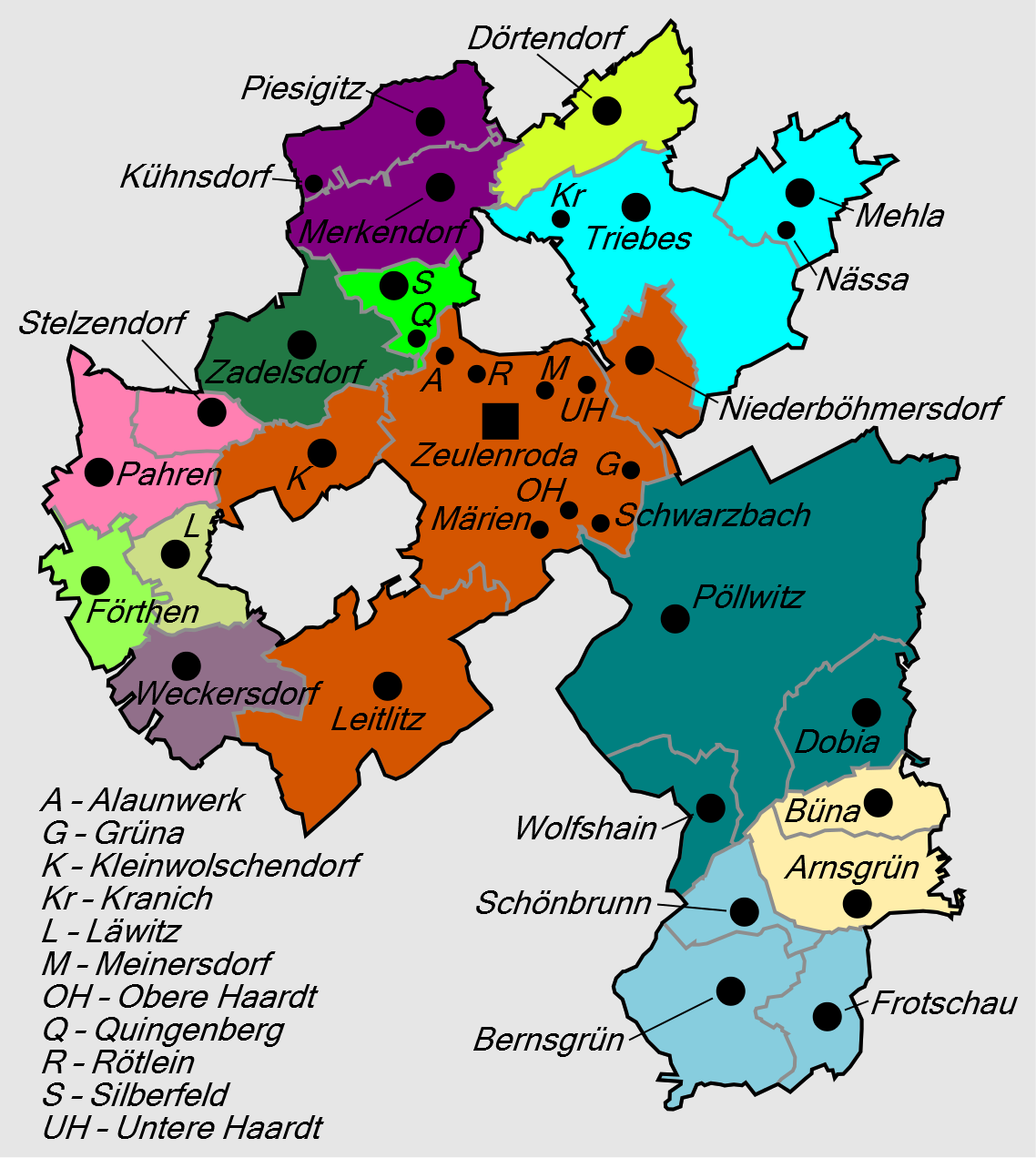 Gliederung der Stadt Zeulenroda-Triebes ab 6. April 1994